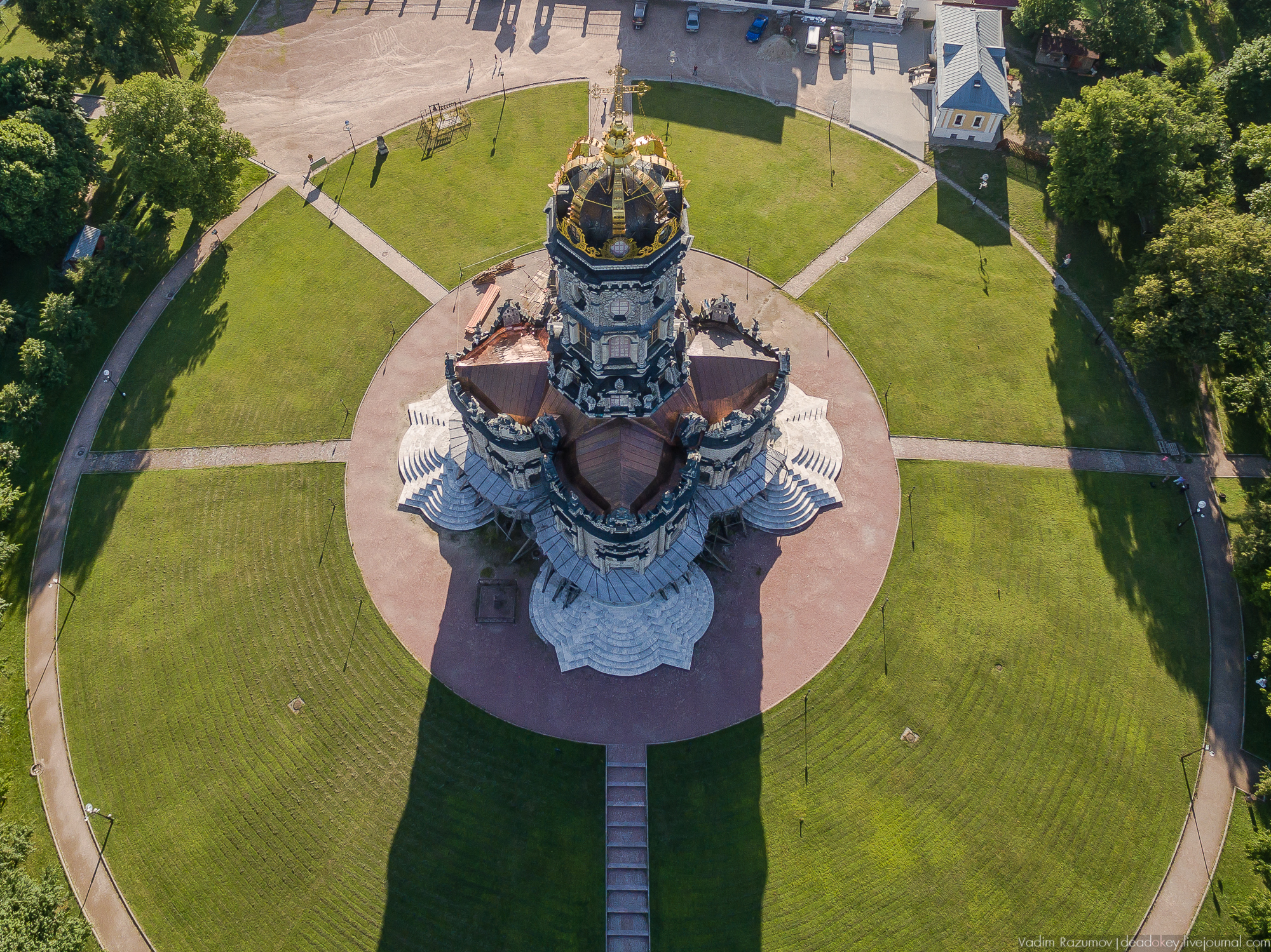 Церковь иконы Божией Матери «Знамение»: Дубровицы, Подольский район, Московская область